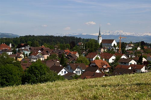 Muri (Nr. 03.1-4455)